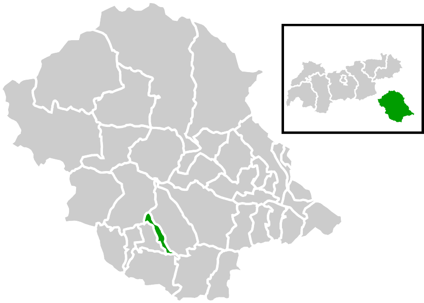 Lage der Gemeinde innerhalb des Bezirks Lienz